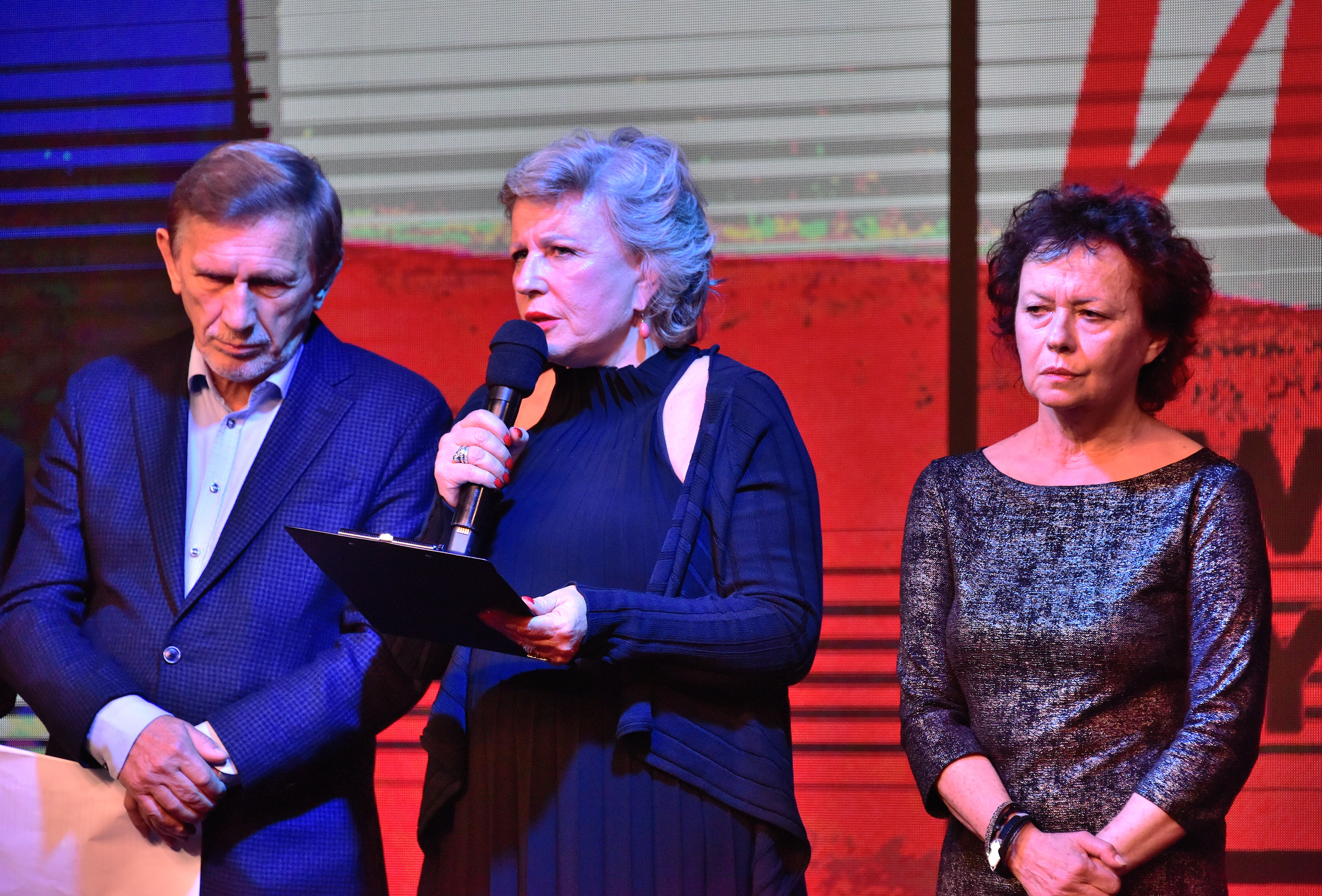 Od lewej: Jan Englert, Krystyna Janda i Joanna Szczepkowska podczas Wieczoru Wyborców w Warszawie